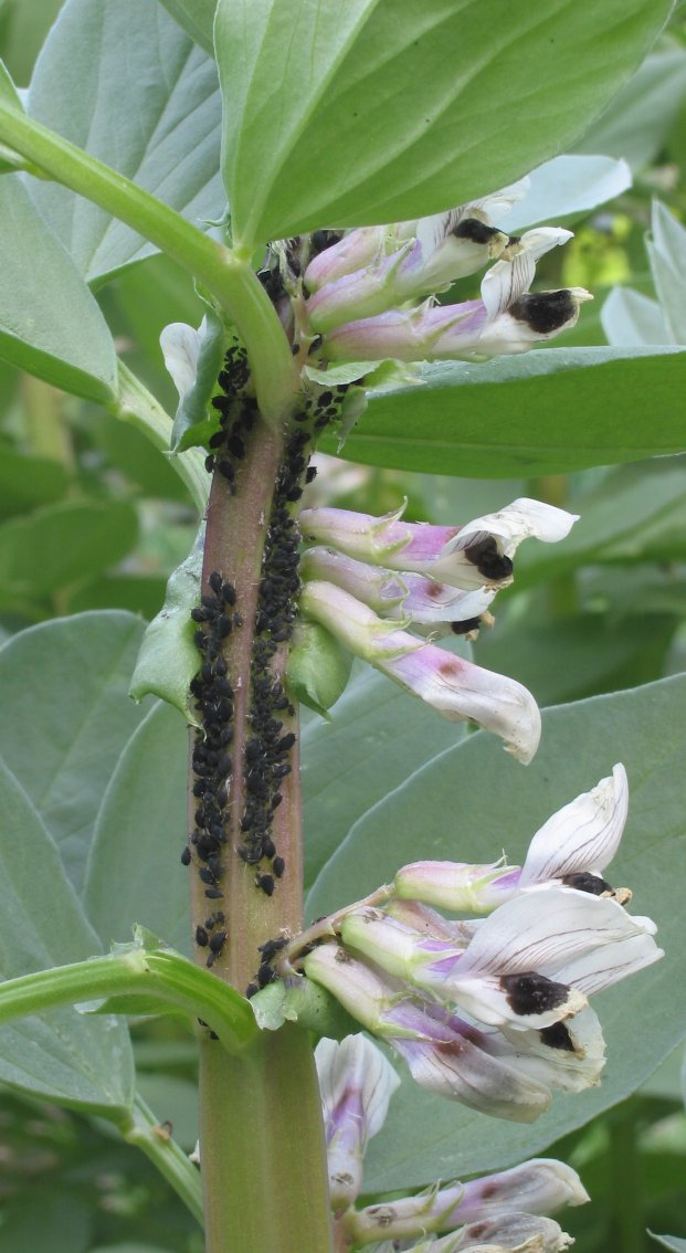 Vicia faba (tuinboon) aphids (luis)